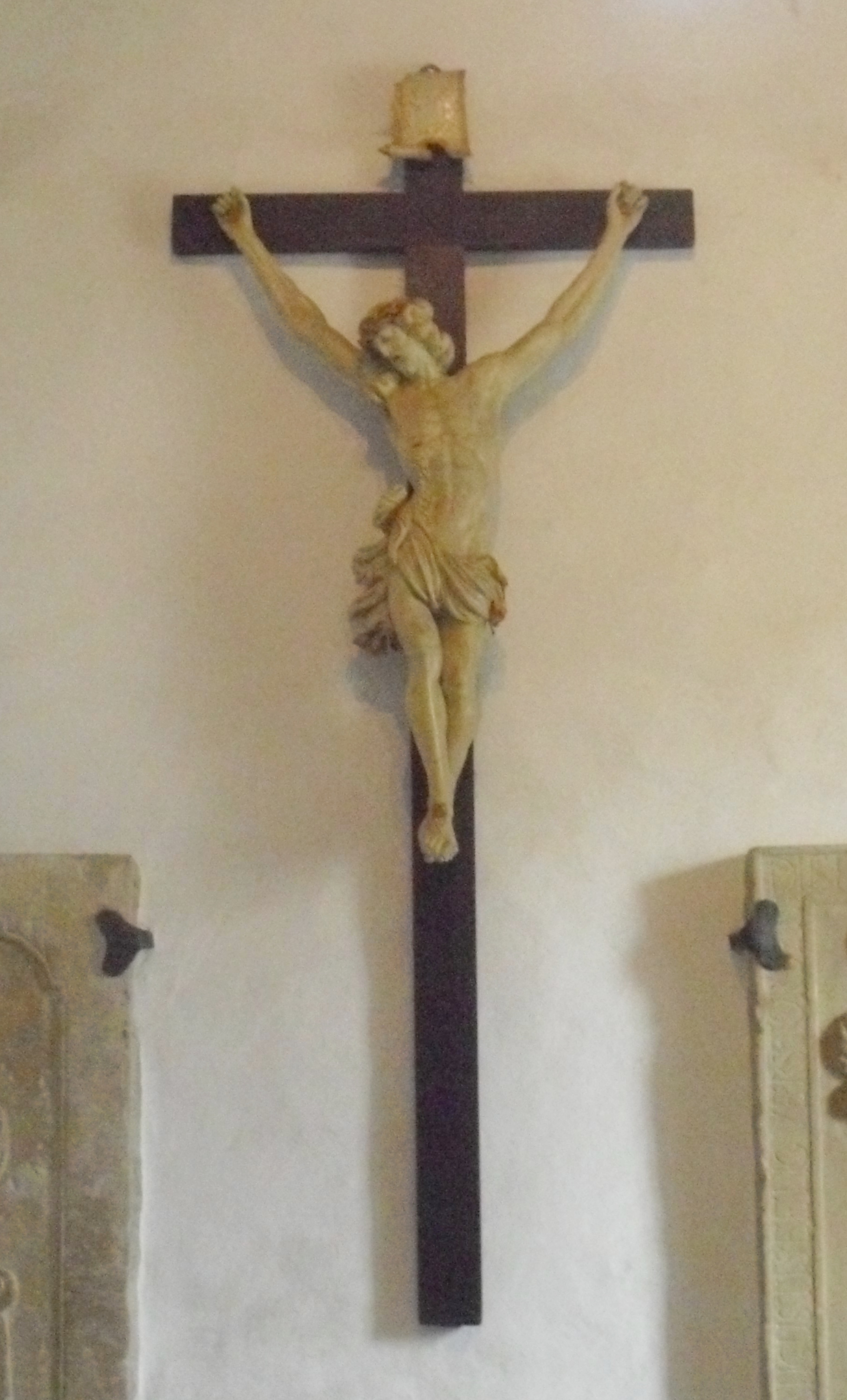 Kruzifix im "Leichhaus" der Stiftskirche in Neuenheerse; von Getrud Gröninger; um 1700